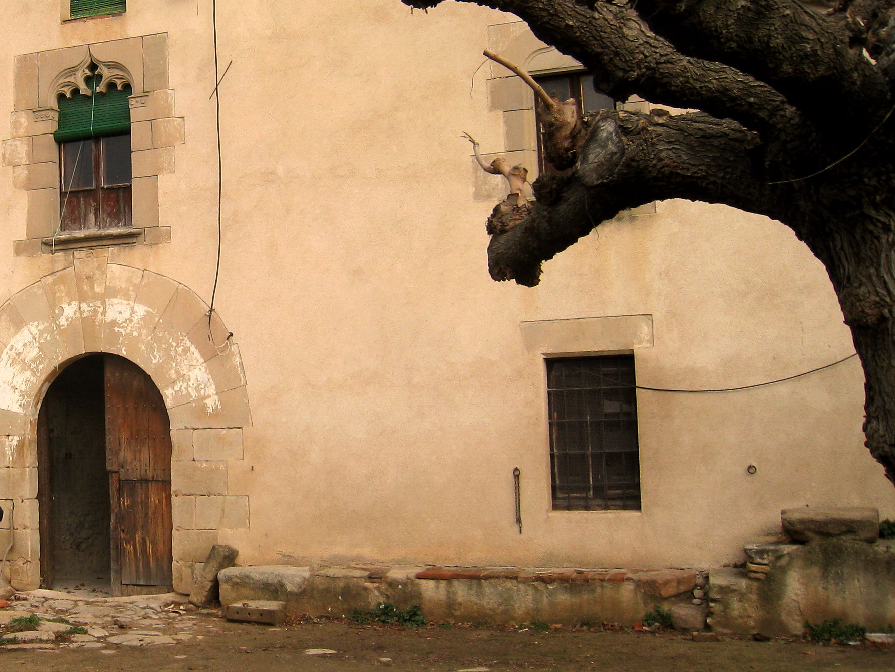 Can Paiàs (Santa Eulàlia de Ronçana). Amb un pedrís amb escales per pujar al cavall en una masia.